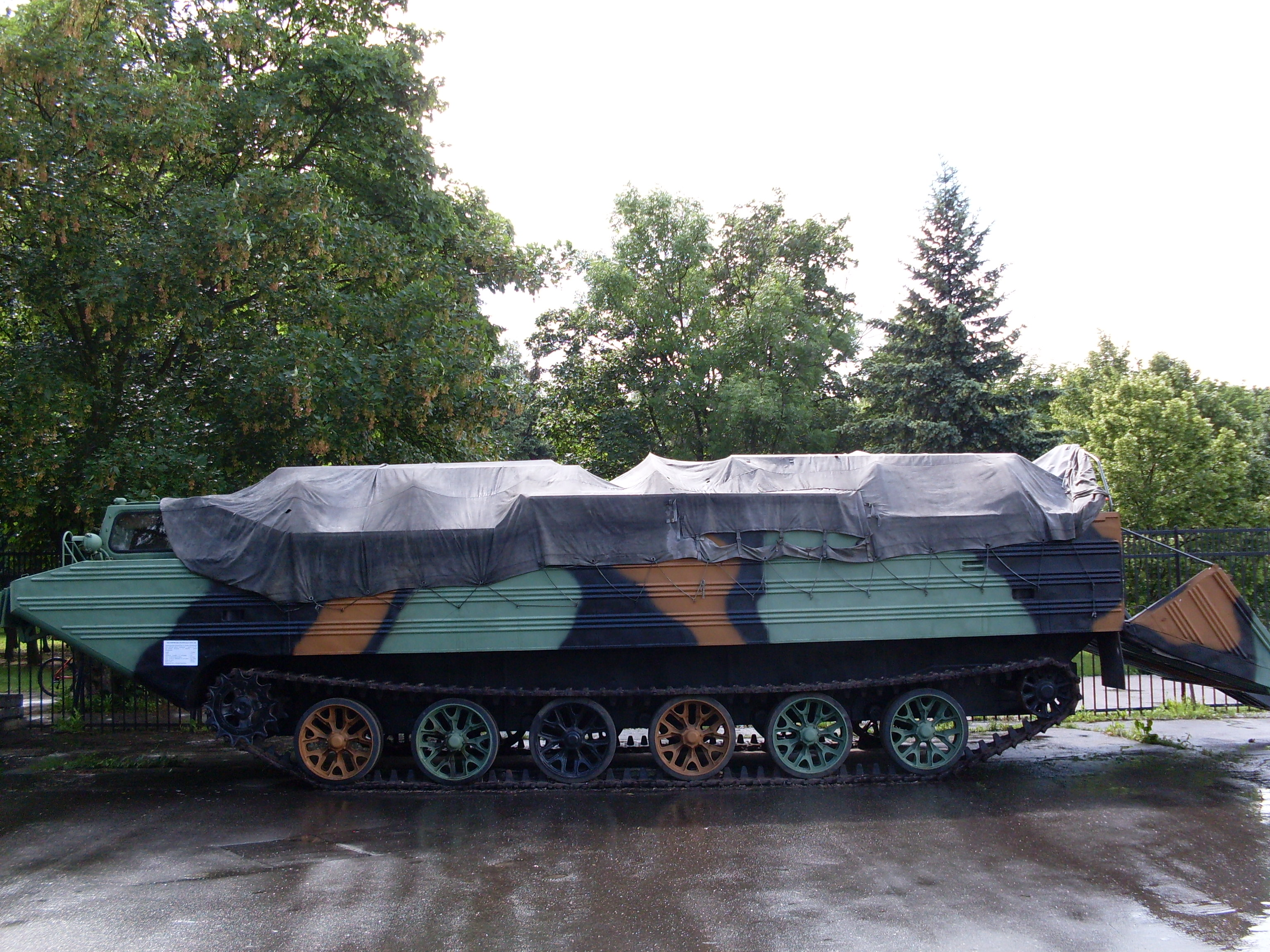 Transporter_pływający_PTS-M.